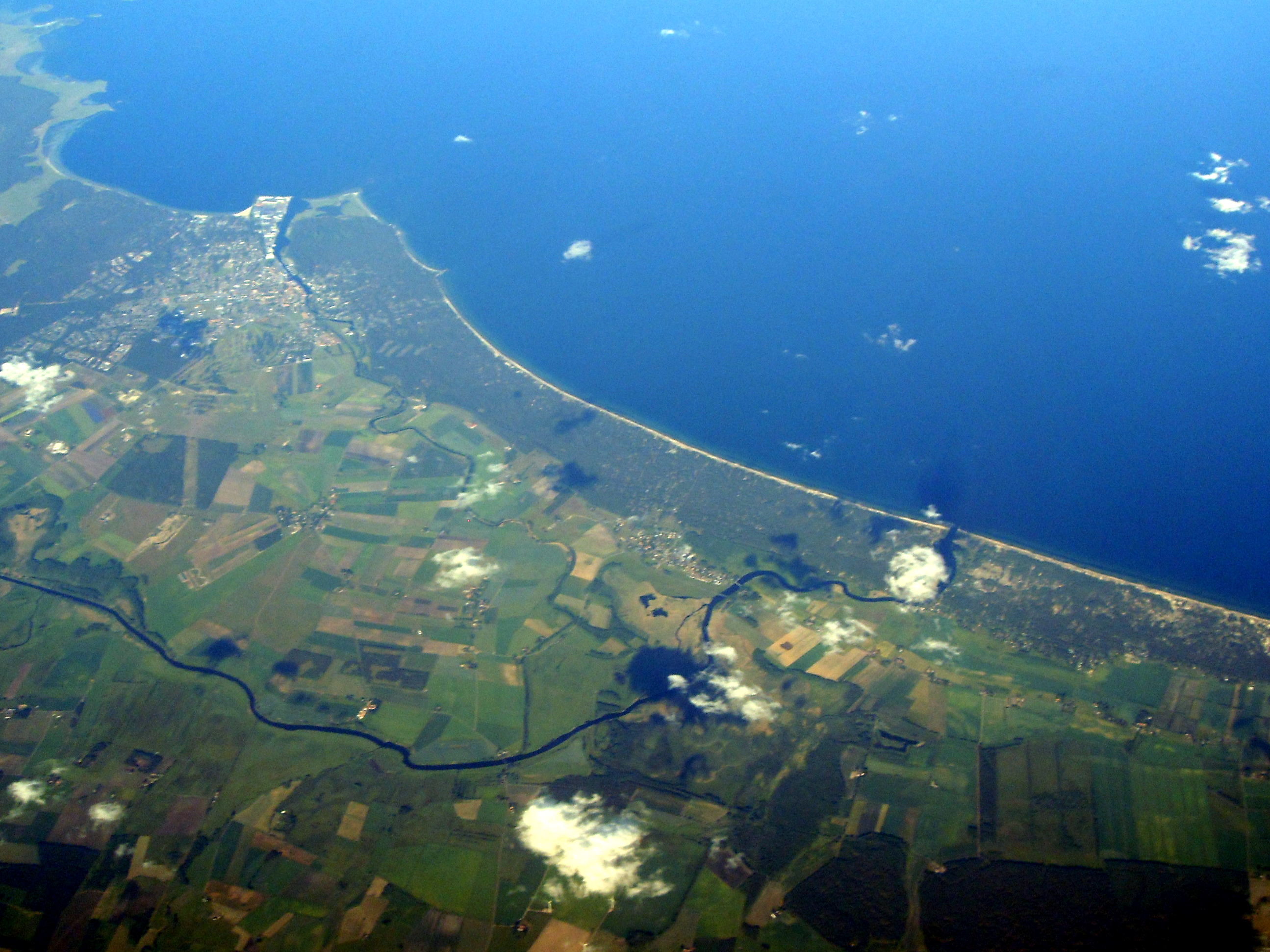 Zatoka Hanöbukten z widocznym miatem Åhus.